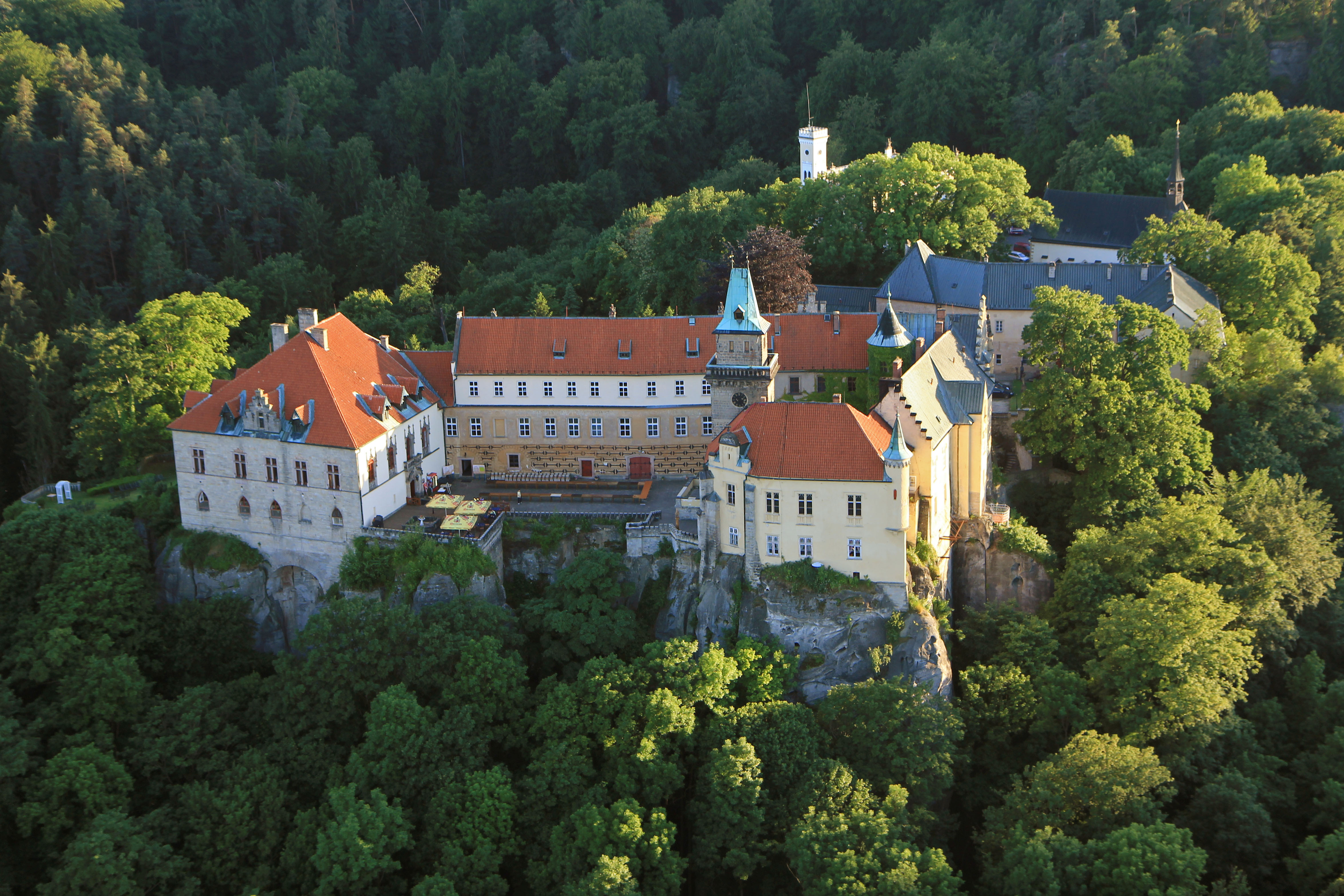 Zámek Hrubá Skála, Hrubá Skála 1, Hrubá Skála.